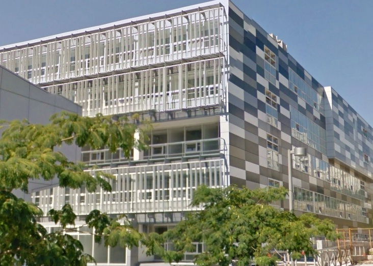 Zgrada Pomorskog fakulteta, Kemijsko-tehnološkog fakulteta i Prirodoslovno-matematičkog fakulteta u Splitu.